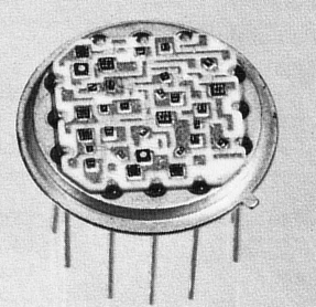 Hybrid Op Amp